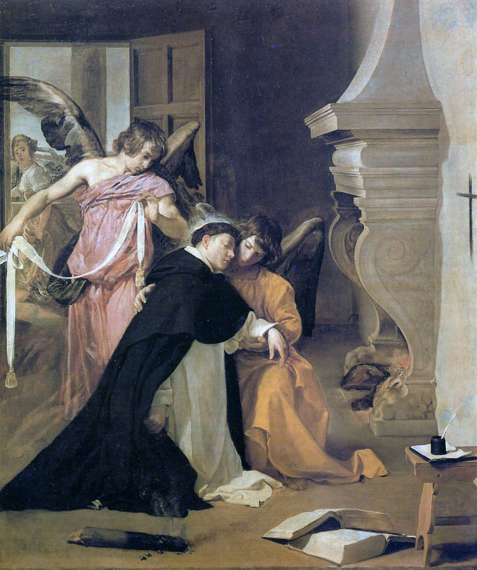 La obra representa al religioso y teólogo dominico Santo Tomás de Aquino siendo confortado por los ángeles tras haber rechazado los favores de una prostituta que aparece en la puerta y al fondo del cuadro.